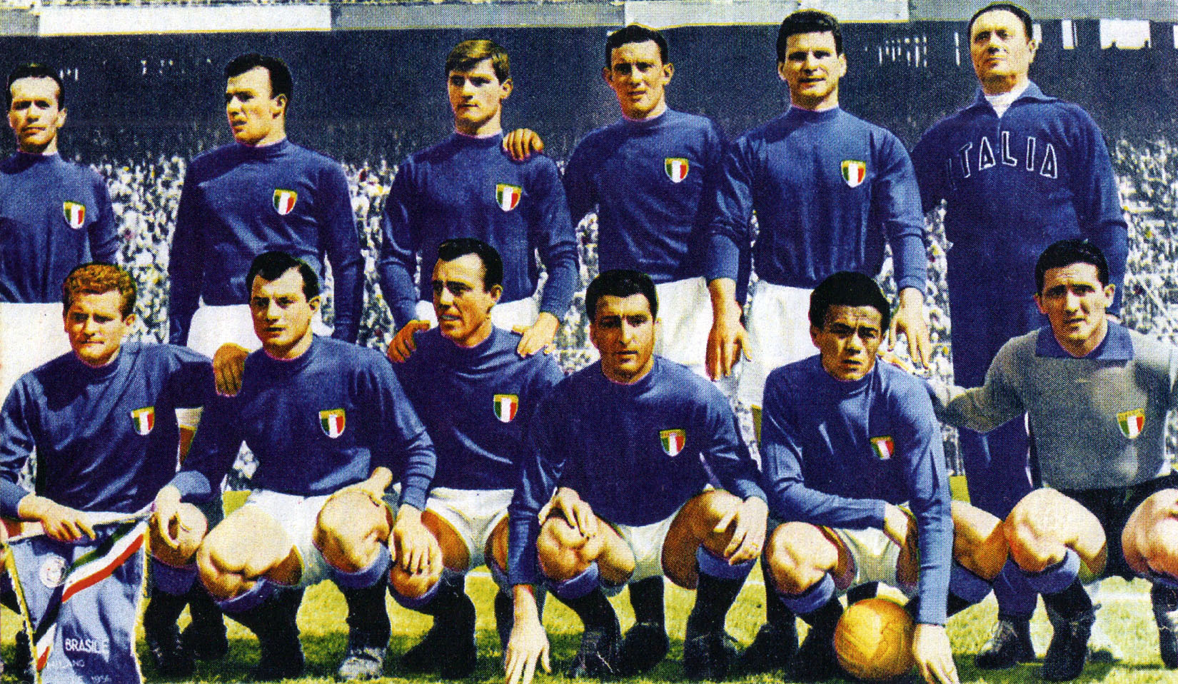 Milano, stadio San Siro, 25 aprile 1956. La formazione dell'Italia scesa in campo nella vittoriosa amichevole contro il Brasile (3-0). Da sinistra, in piedi: R. Carapellese, S. Cervato, G. Virgili, A. Magnini, G. Gratton, Farabullini (massaggiatore); accosciati: G. Boniperti (capitano), G. Bernasconi, G. Chiappella, A. Segato, M. Montuori, G. Viola.